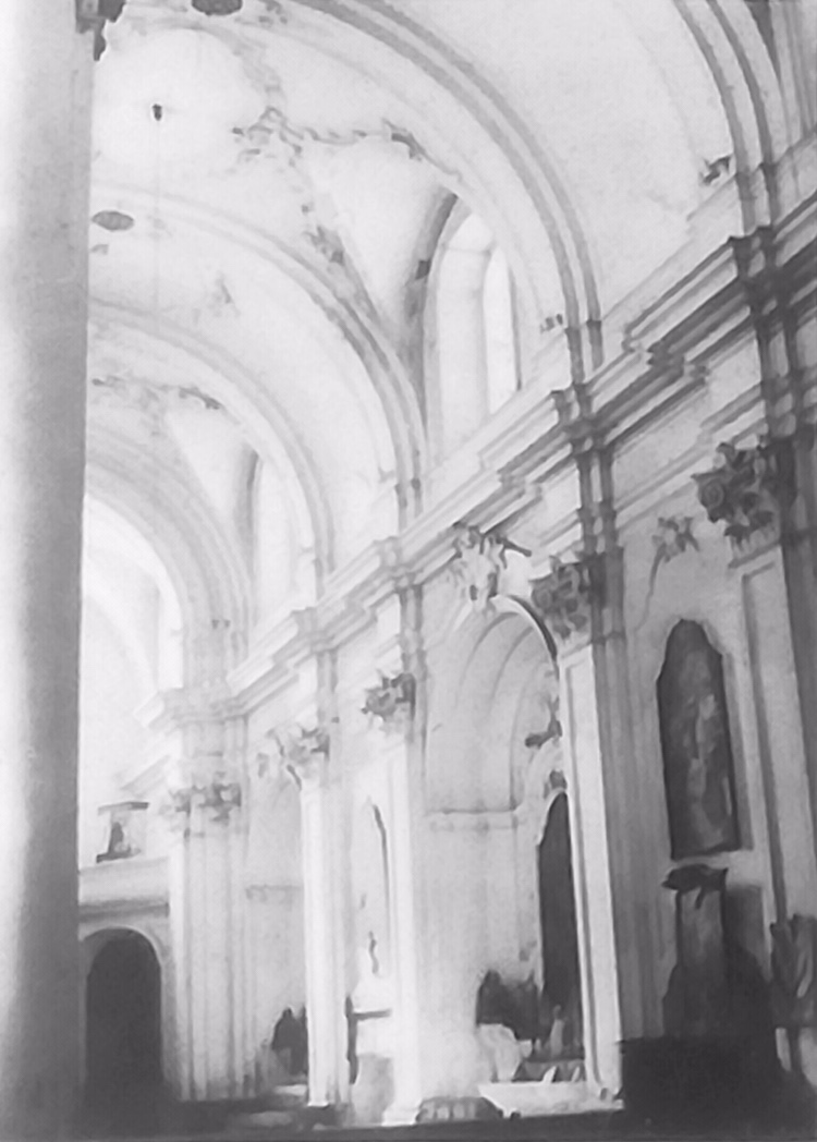 Navata dell'Abbazia Florense in stile Barocco (Anni '30)